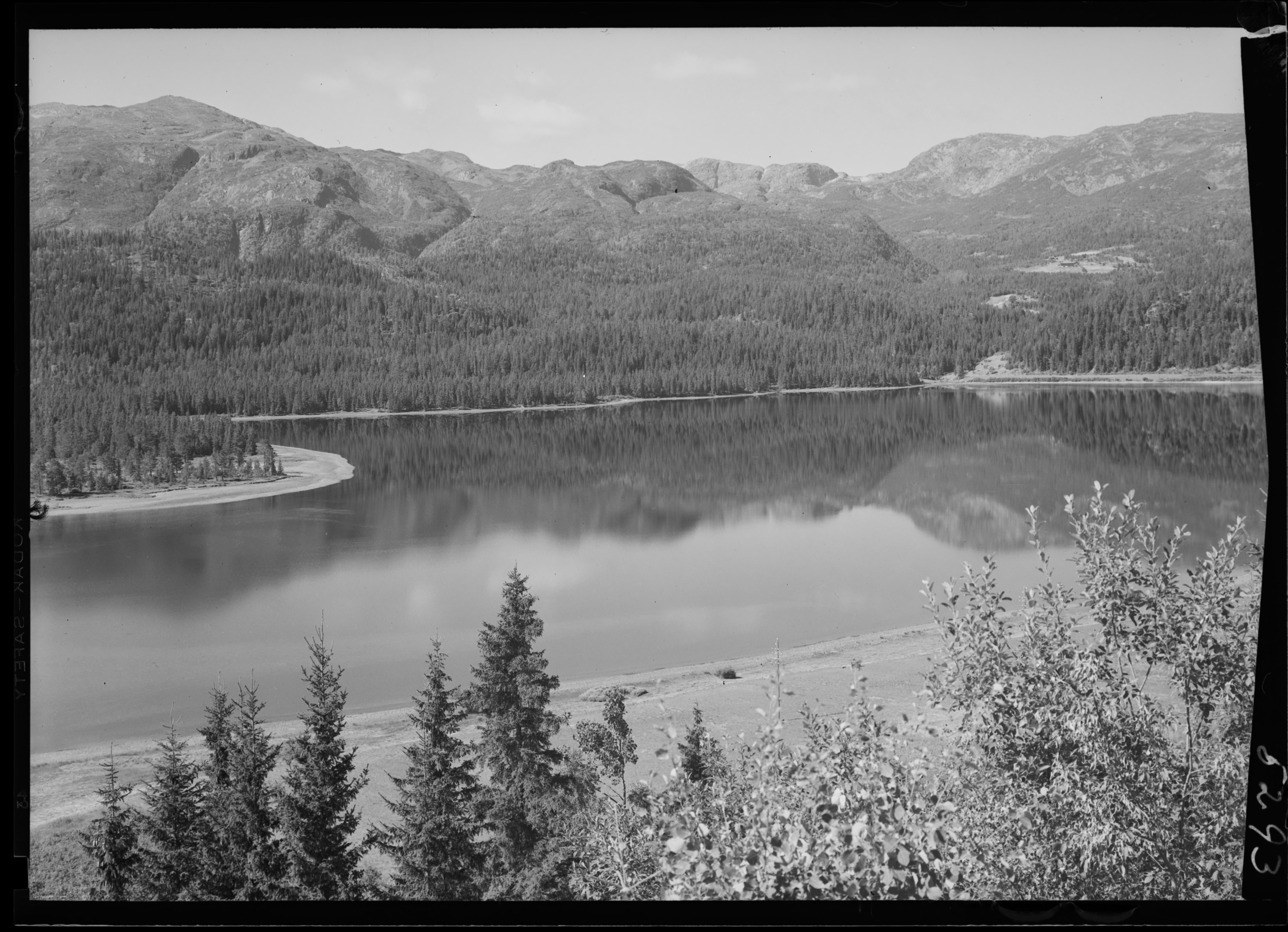 Bildet er hentet fra Nasjonalbibliotekets bildesamling. Anmerkninger til bildet var: Fotograf : ukjent Vinjevatn, Vinje, Telemark